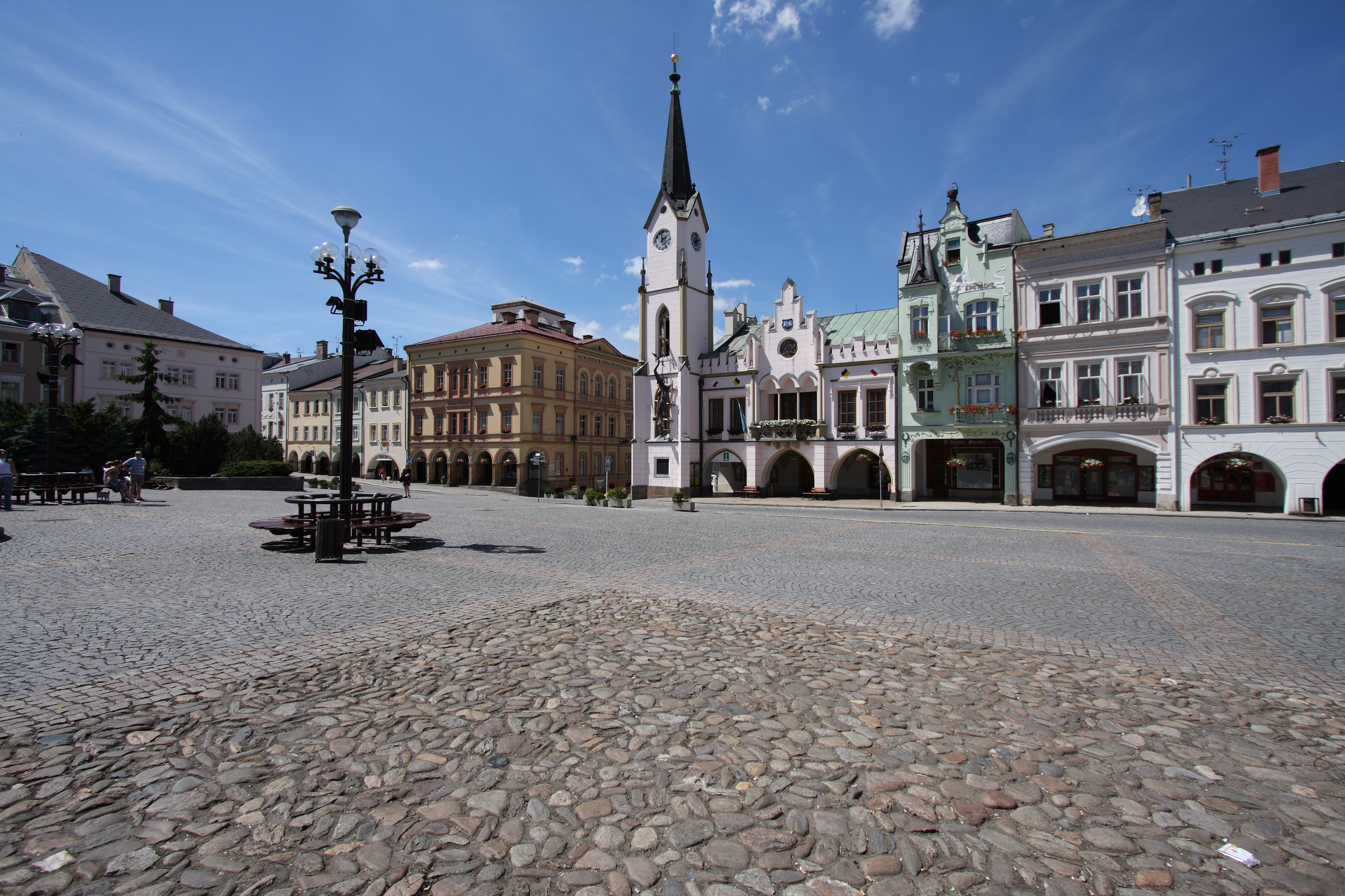 Krakonošovo náměstí v Trutnově - Haasův palác, Stará radnice, lékárna U Anděla strážce.